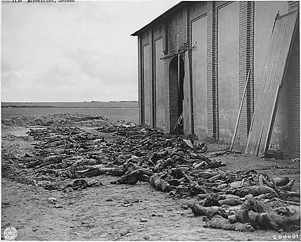 Gardelegen_Isenschnibber_Feldscheune Public Domain ARC Identifier: 292595 These are the bodies of victims of mass burning at Gardelegen prison camp. They will be buried by German civilians under the supervision of U.S. Ninth Army troops. 4/22/45.